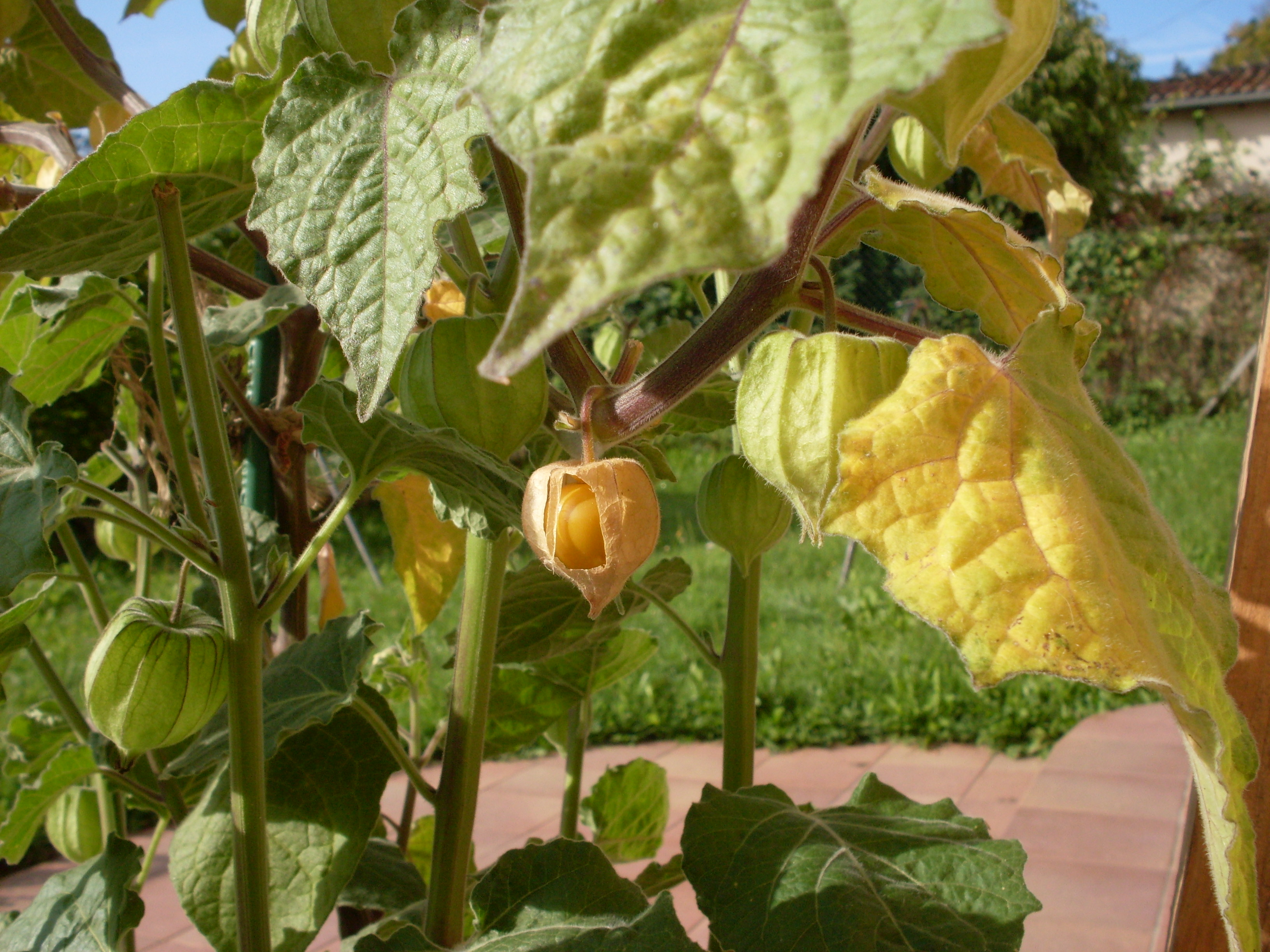 Physalis peruviana cultivé dans un jardin en Dordogne, France. Le calice a été ouvert pour faire apparaître le fruit.